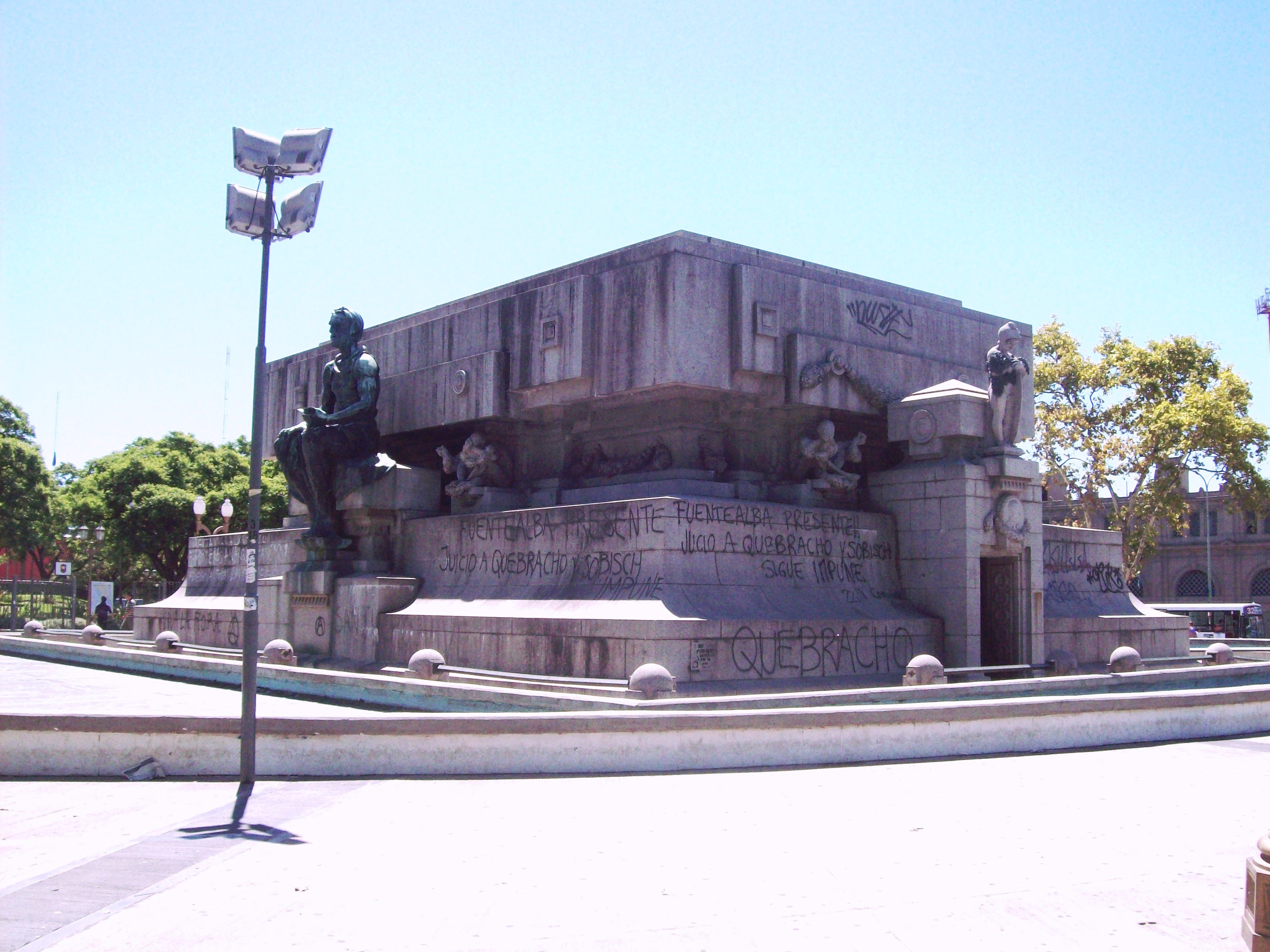 Mausoleo de Bernardino Rivadavia obra de Rogelio Yrurtia, en la Plaza Miserere, ciudad de Buenos Aires.